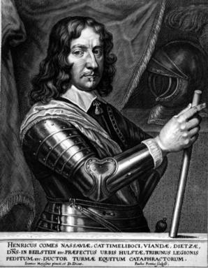 Hendrik van Nassau-Siegen